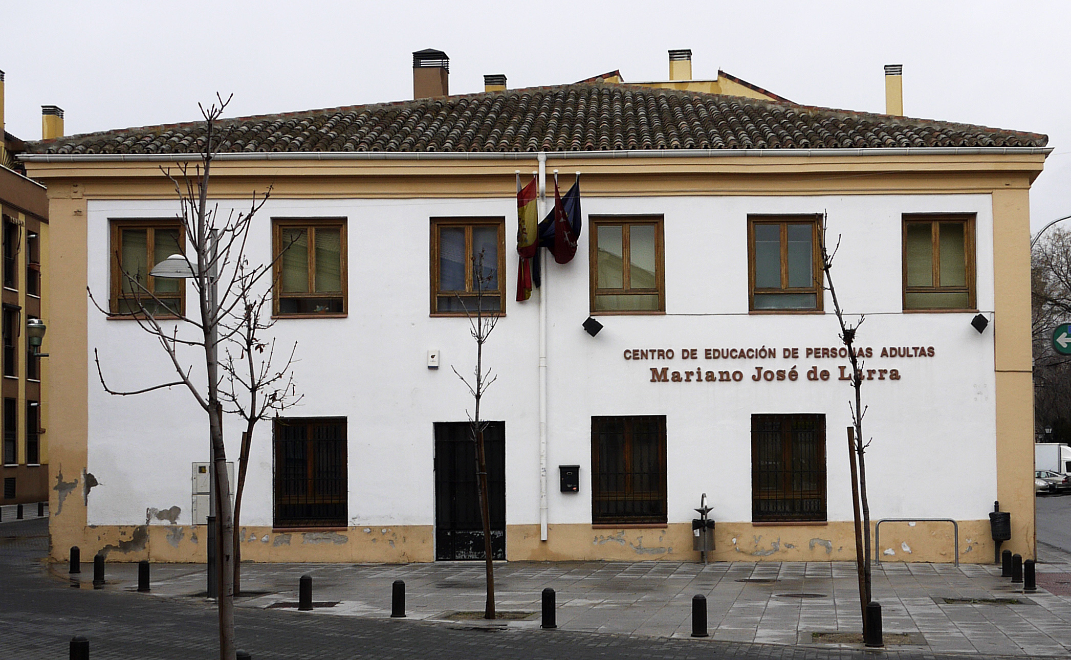 Centro de educación de personas adultas, Pinto, Madrid, España